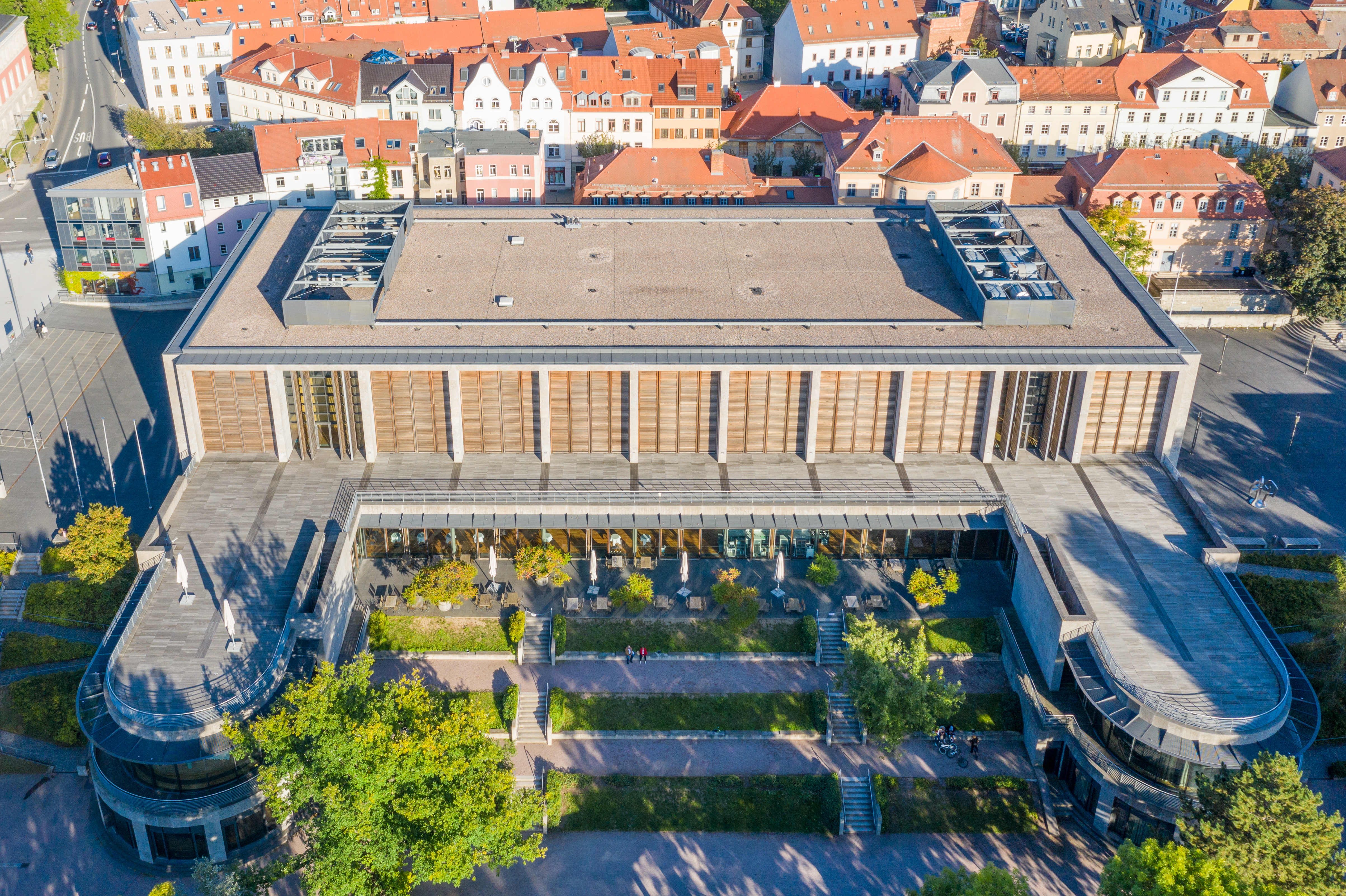 Weimarhalle, Weimar